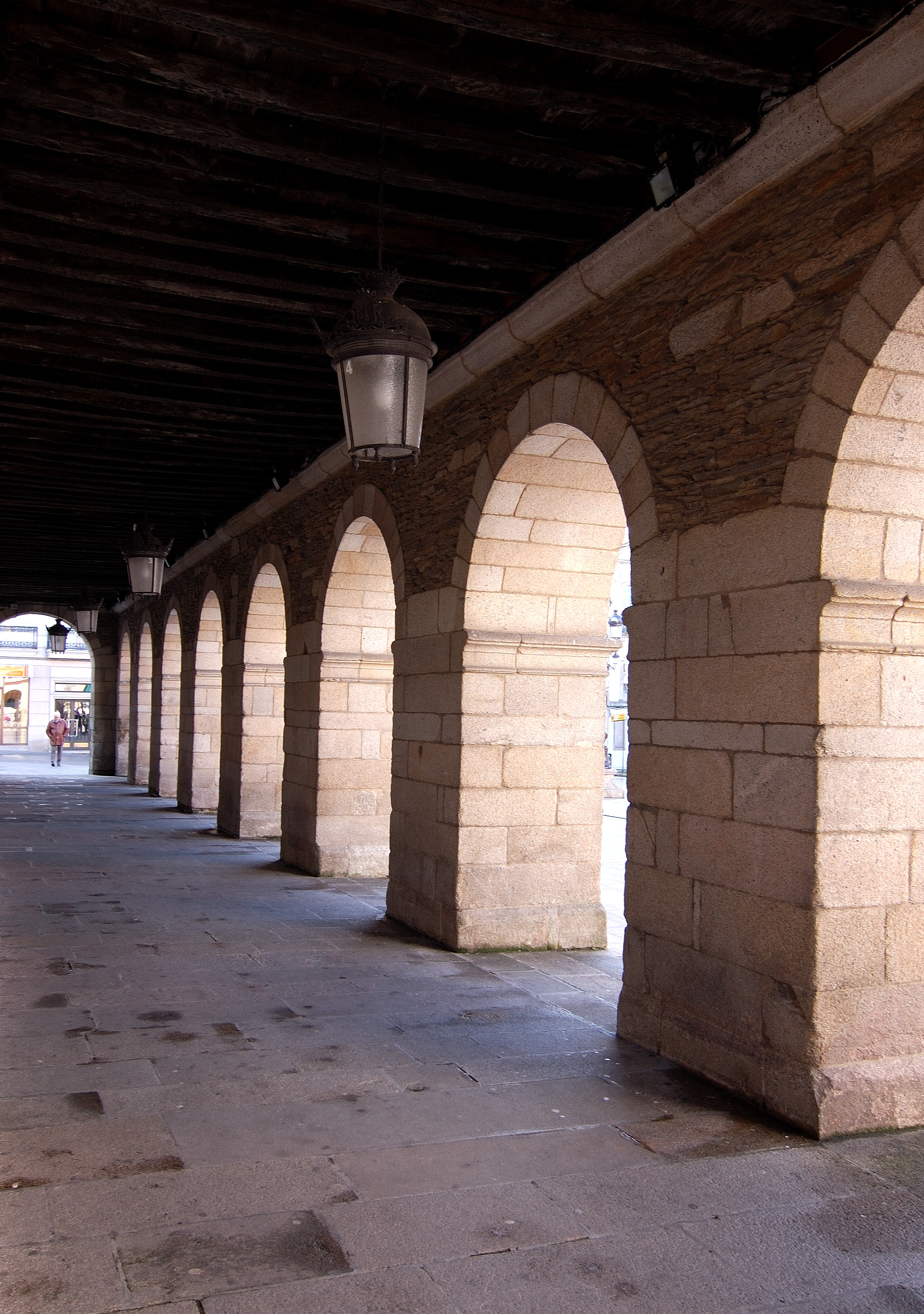 Lugo, Galicia, Spain [2006]'Lugo, Calicia [2006]'